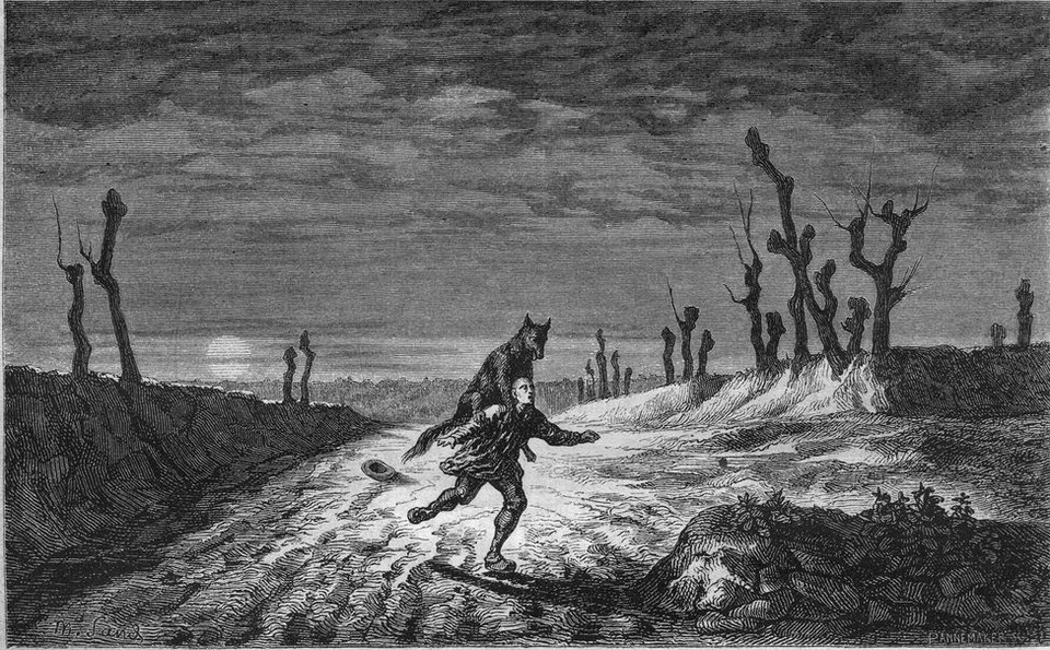 Gravure représentant une ganipote, créature légendaire proche du loup-garou.